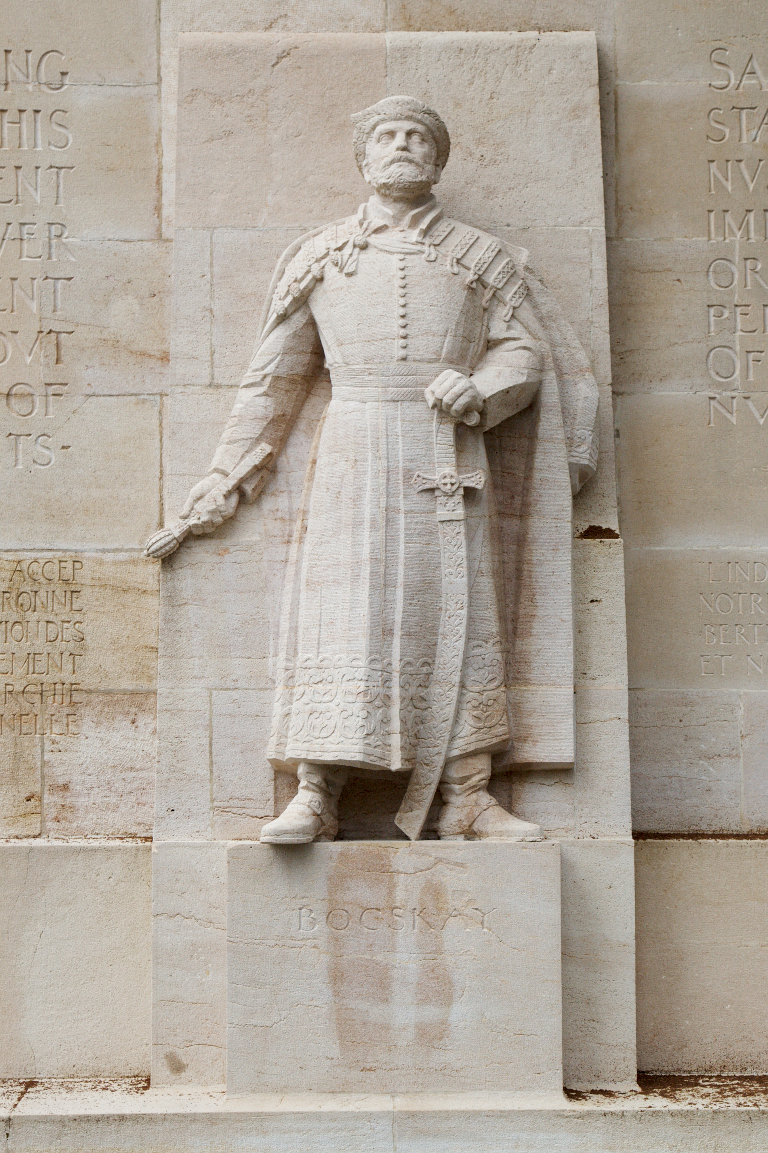 Statue de Bogskay. Mur des Réformateurs